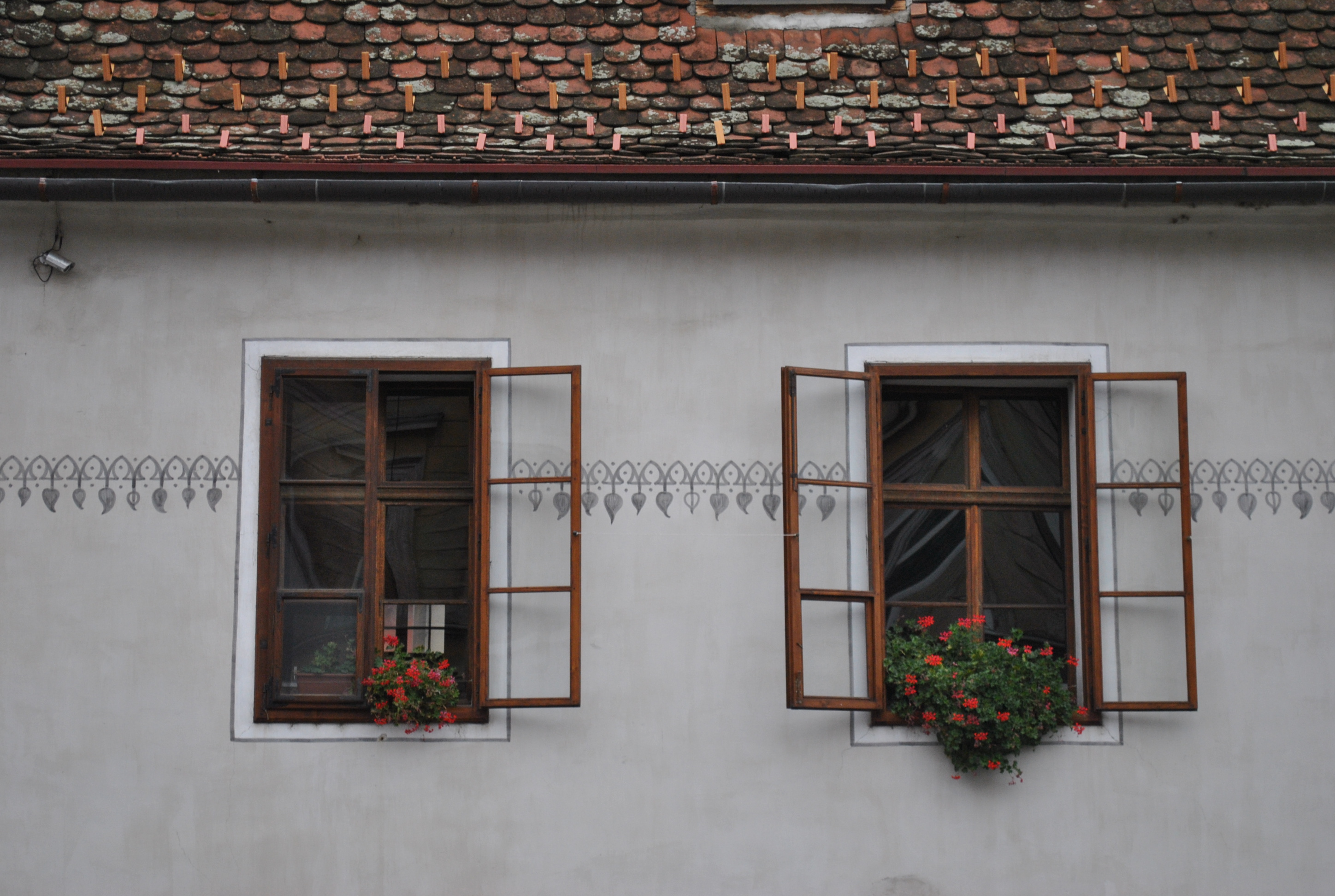 Casă, sec. XIV, sf. sec. XV